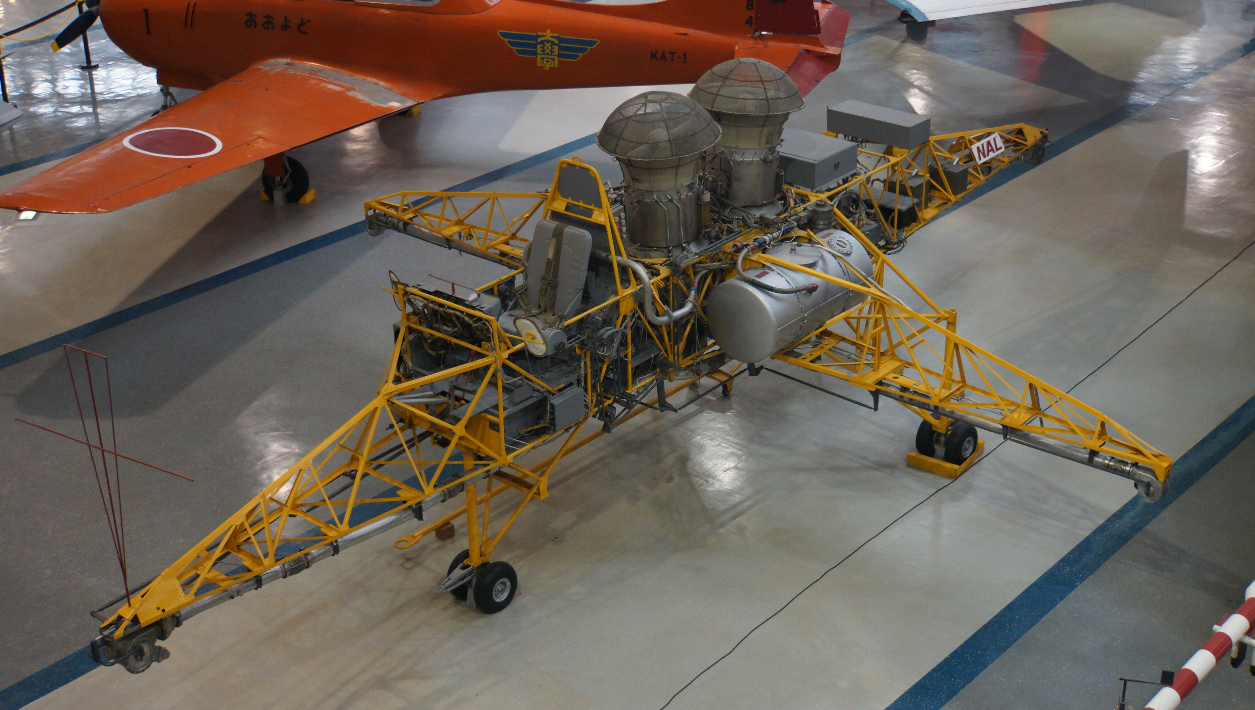 航空宇宙技術研究所（NAL） VTOL実験機フライング・テストベッド 上面。2014年11月2日 かかみがはら航空宇宙科学博物館内にて。